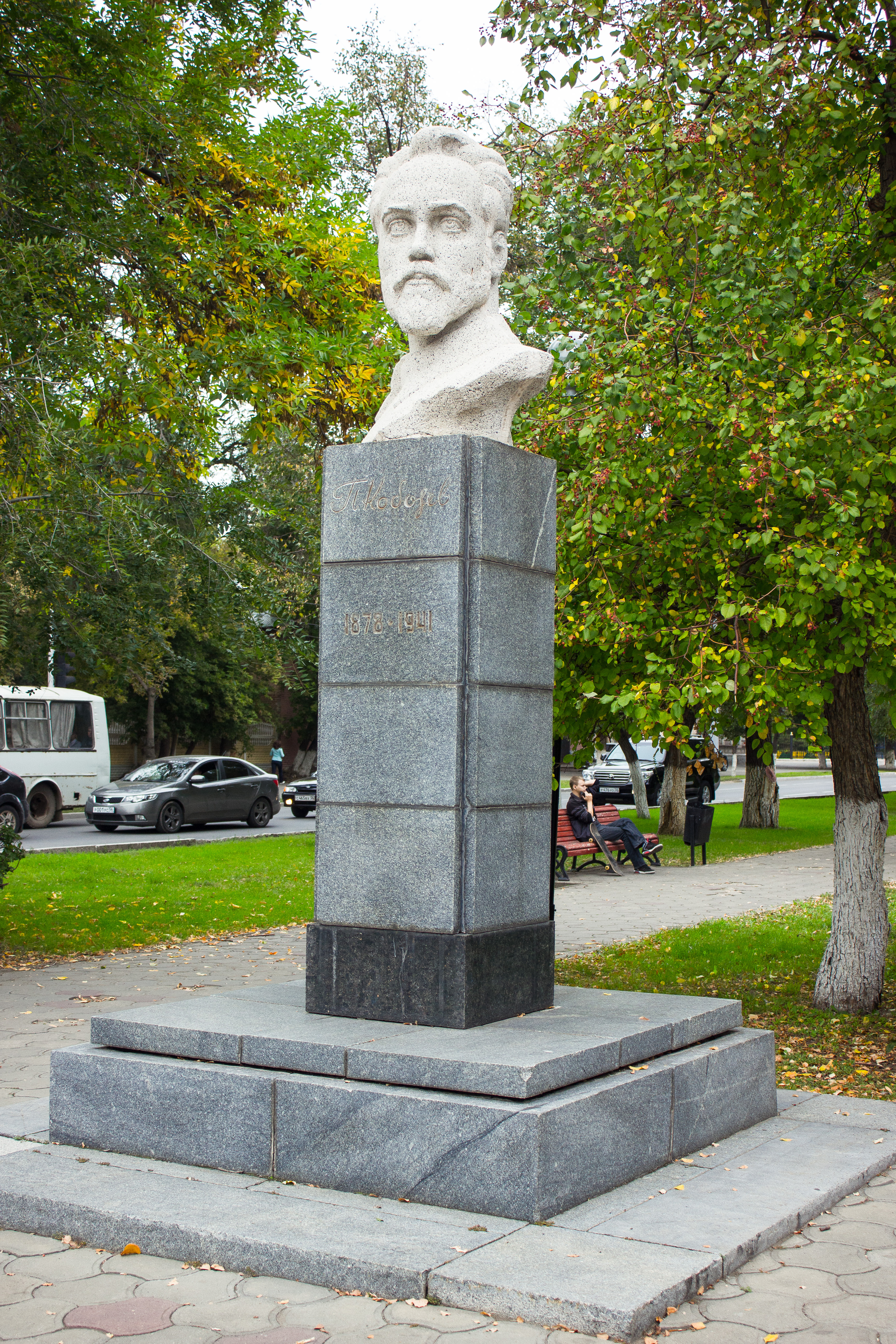 Памятник Кобозеву П.А.: сквер по улице Постникова, Оренбург, Оренбургская область